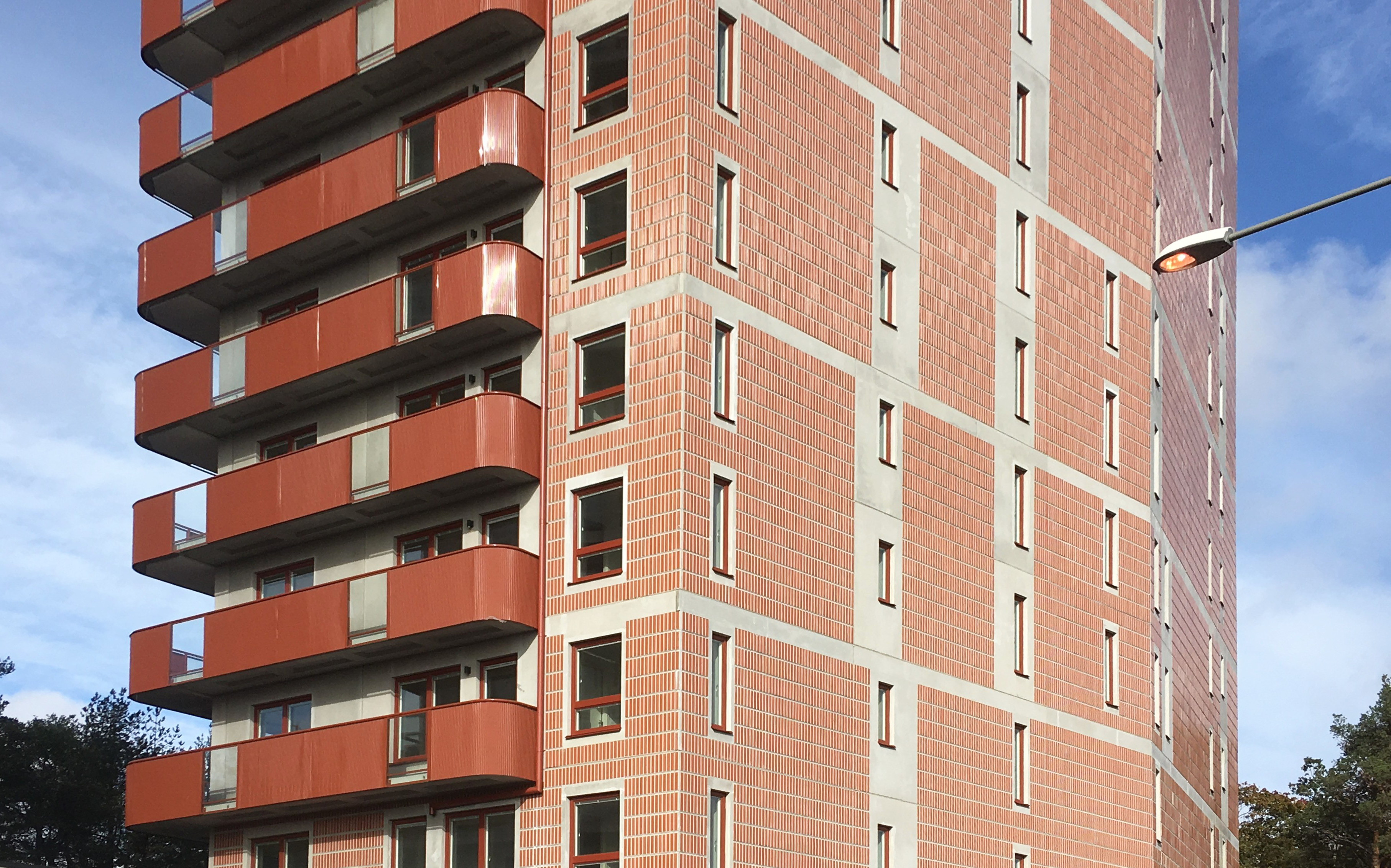 Årstahusen, fasaddetalj